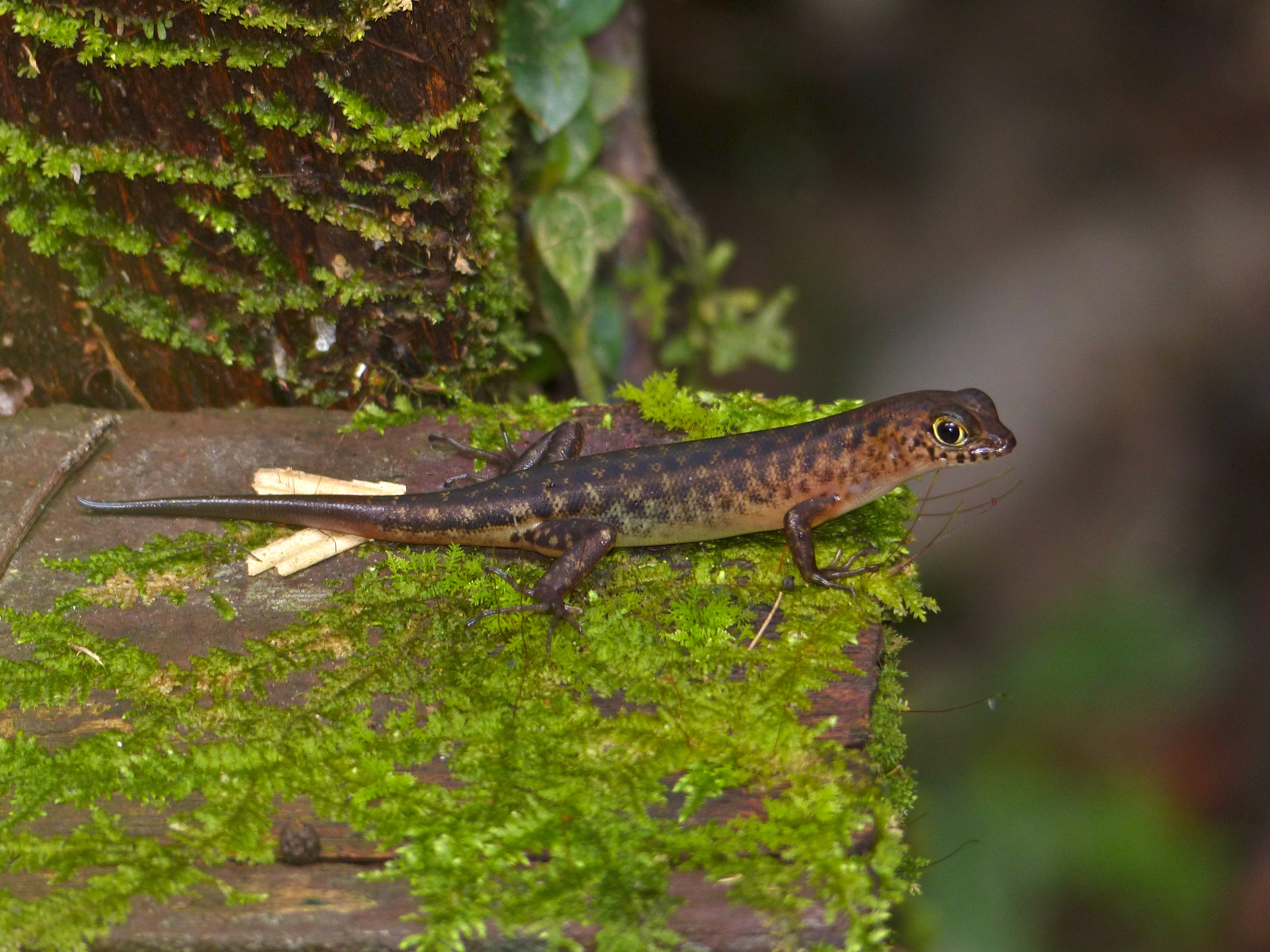 Botanic Trail, Mulu NP, Sarawak, MALAYSIA